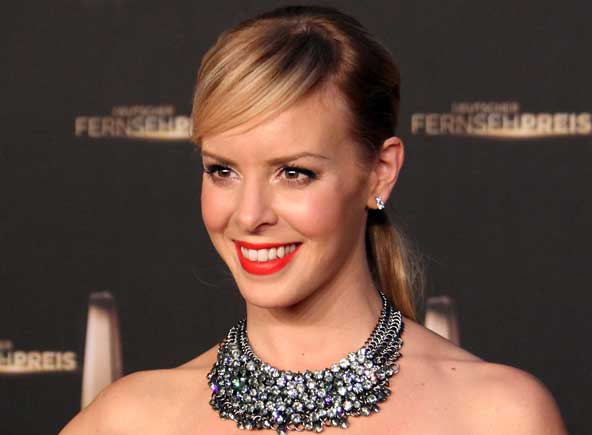 Isabel Edvardsson beim Deutschen Fernsehpreis 2012